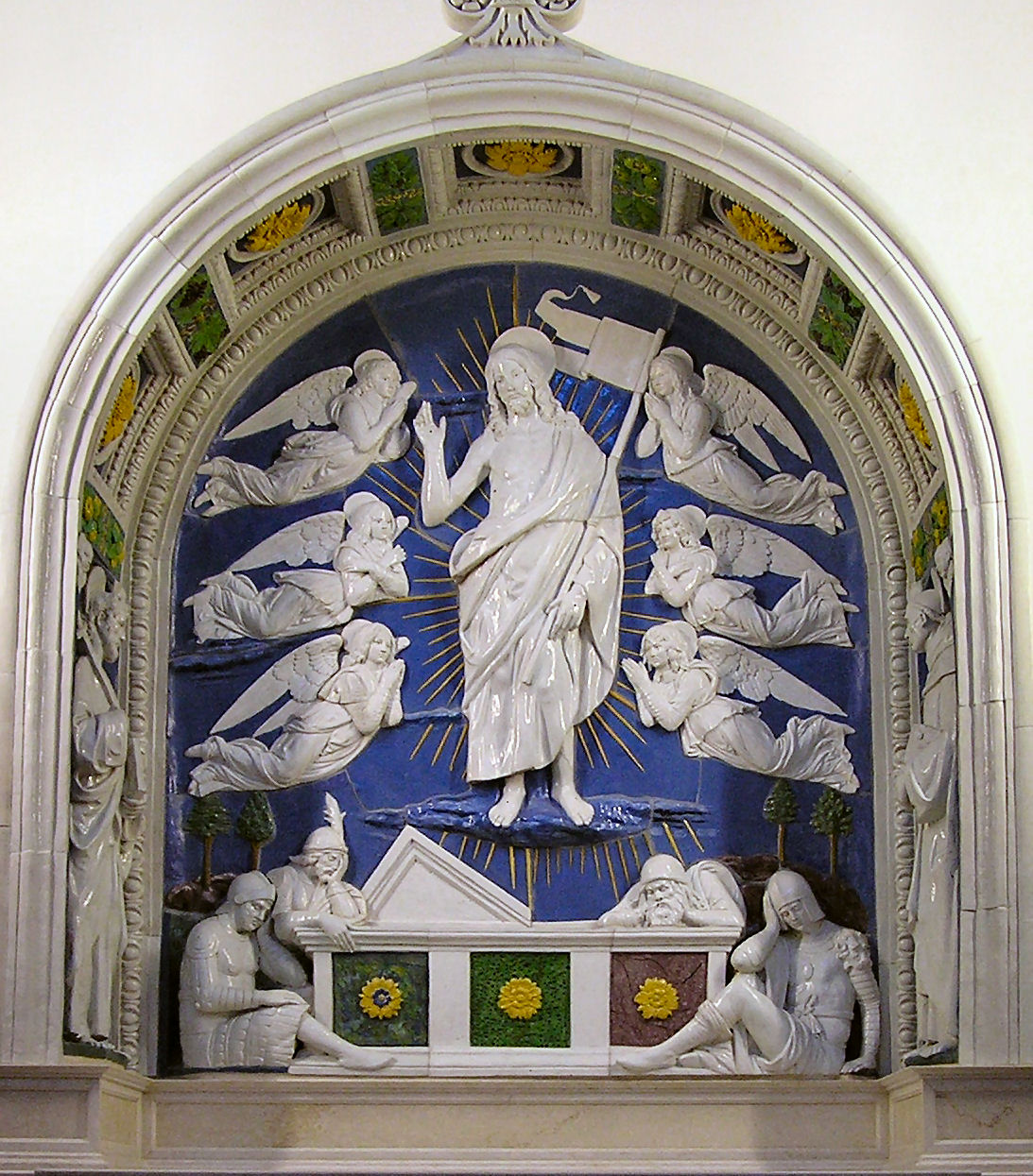 Andrea della Robbia: Resurrection, Opstandelsen, Bode Museum, Berlin